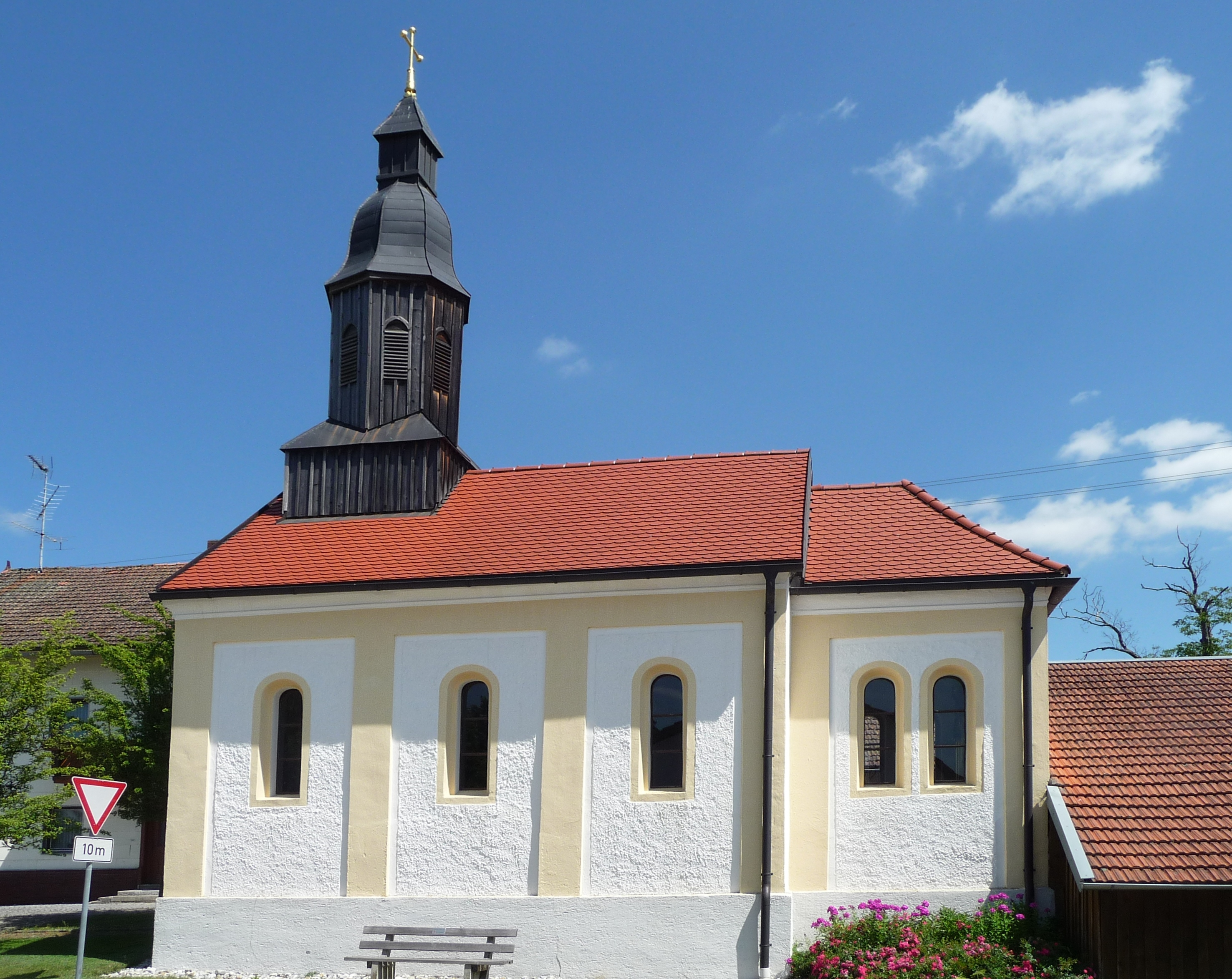 Die Kapelle in Taiding